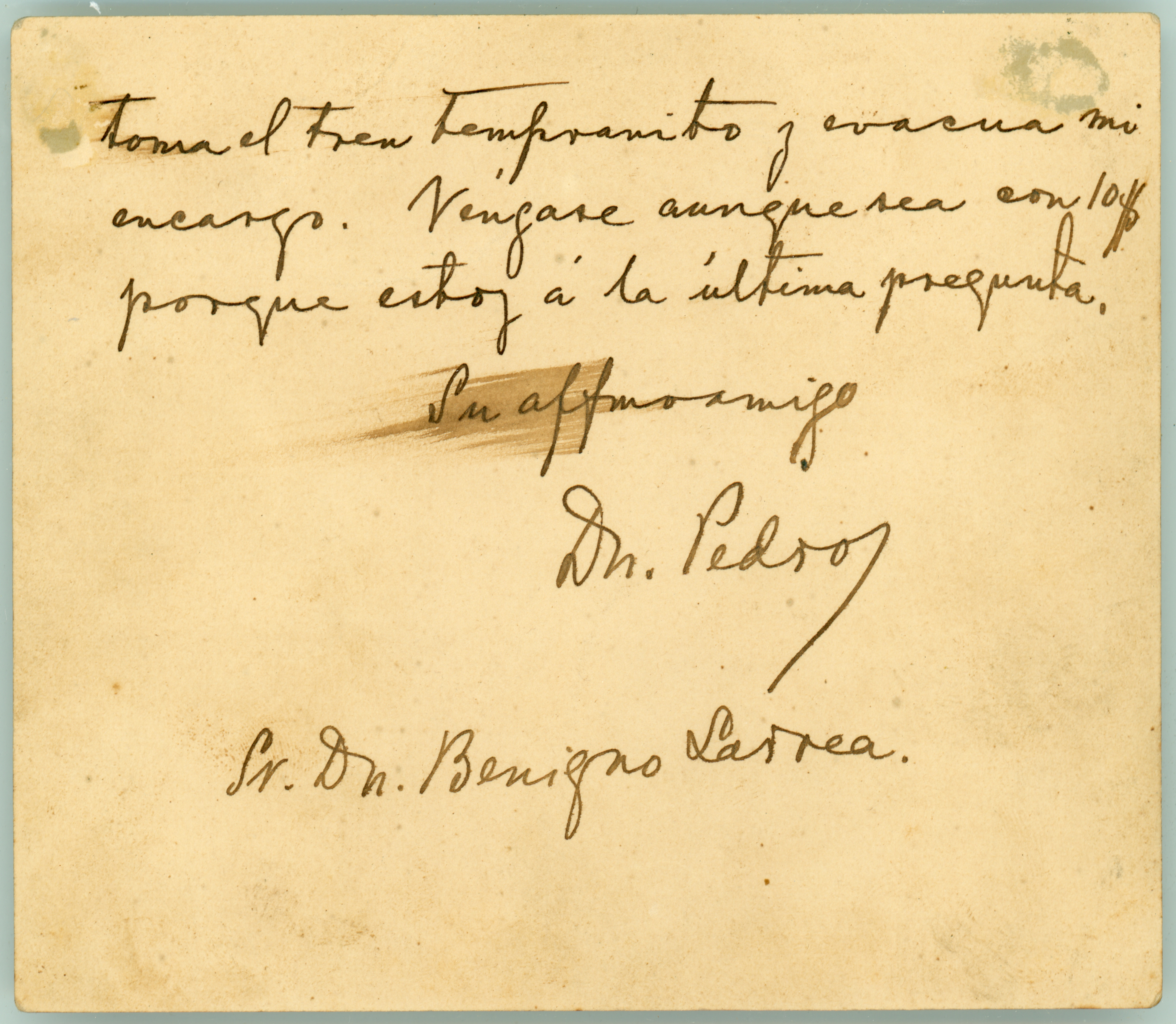 carta del poeta Almafuerte a Benigno Correa